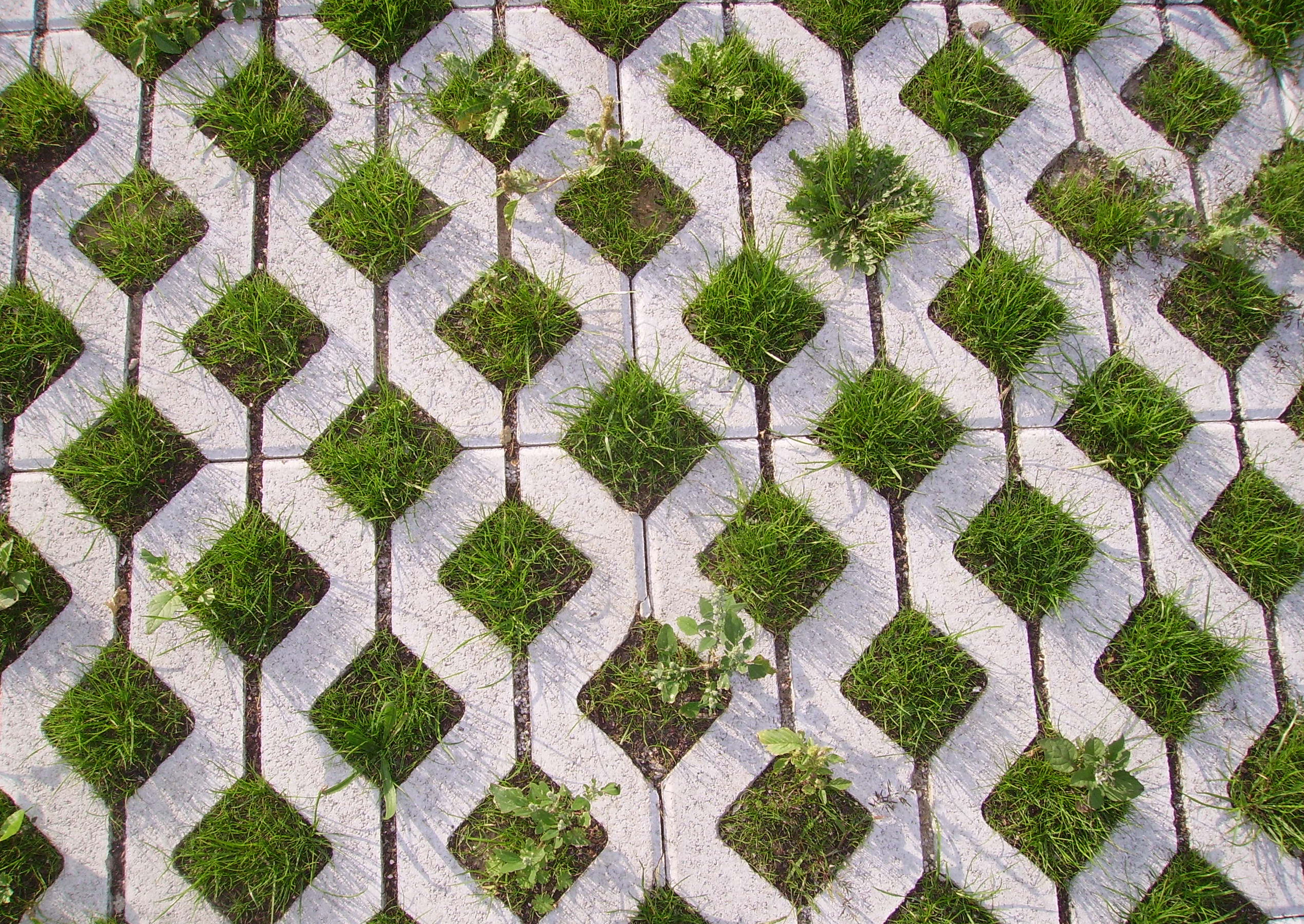 pavement